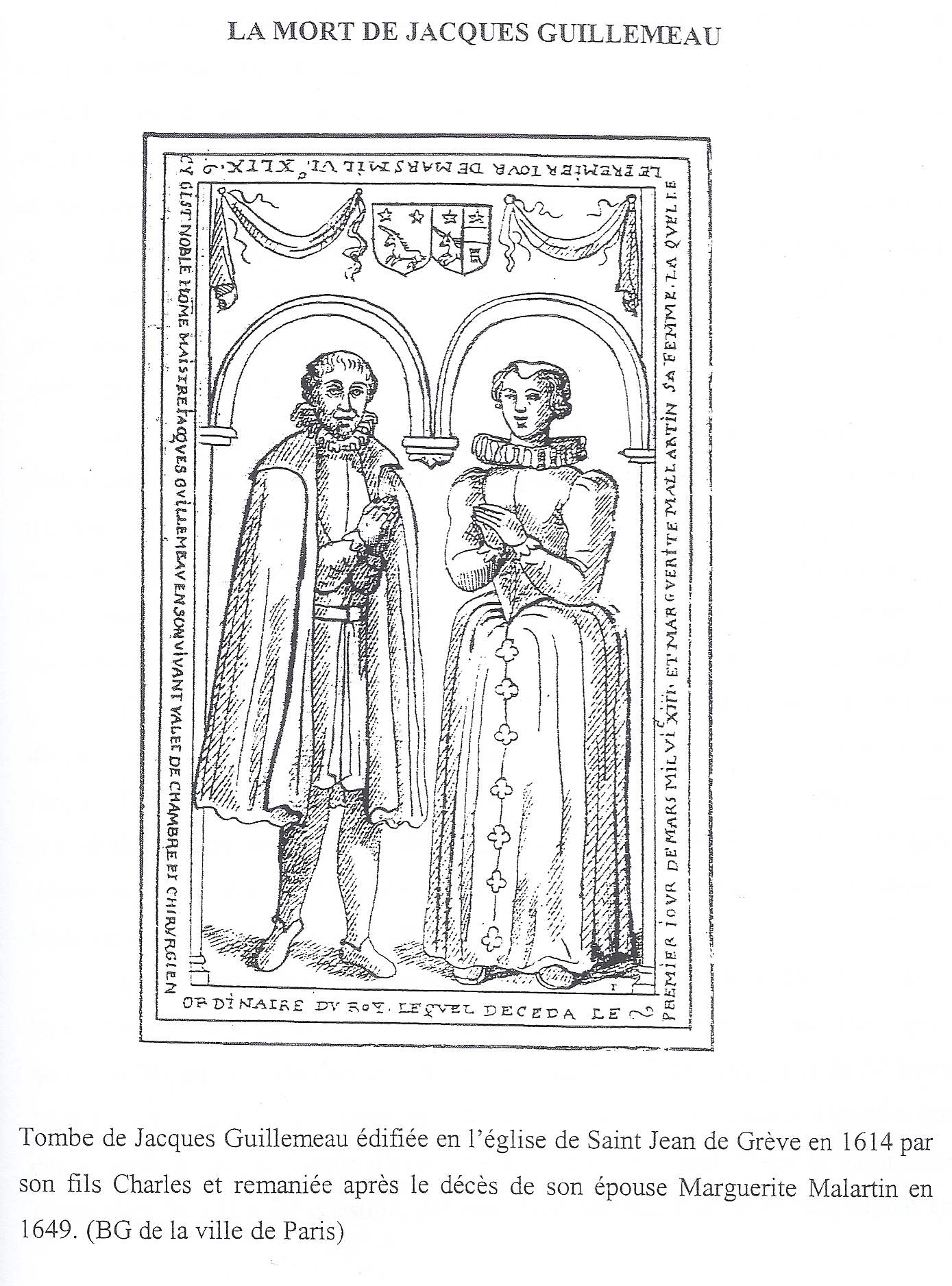 Tombe de Jacques Guillemeau édifiée en l'église de Saint Jean de Grève en 1614 par son fils Charles et remaniée après le décès de son épouse Marguerite Malartin en 1649.